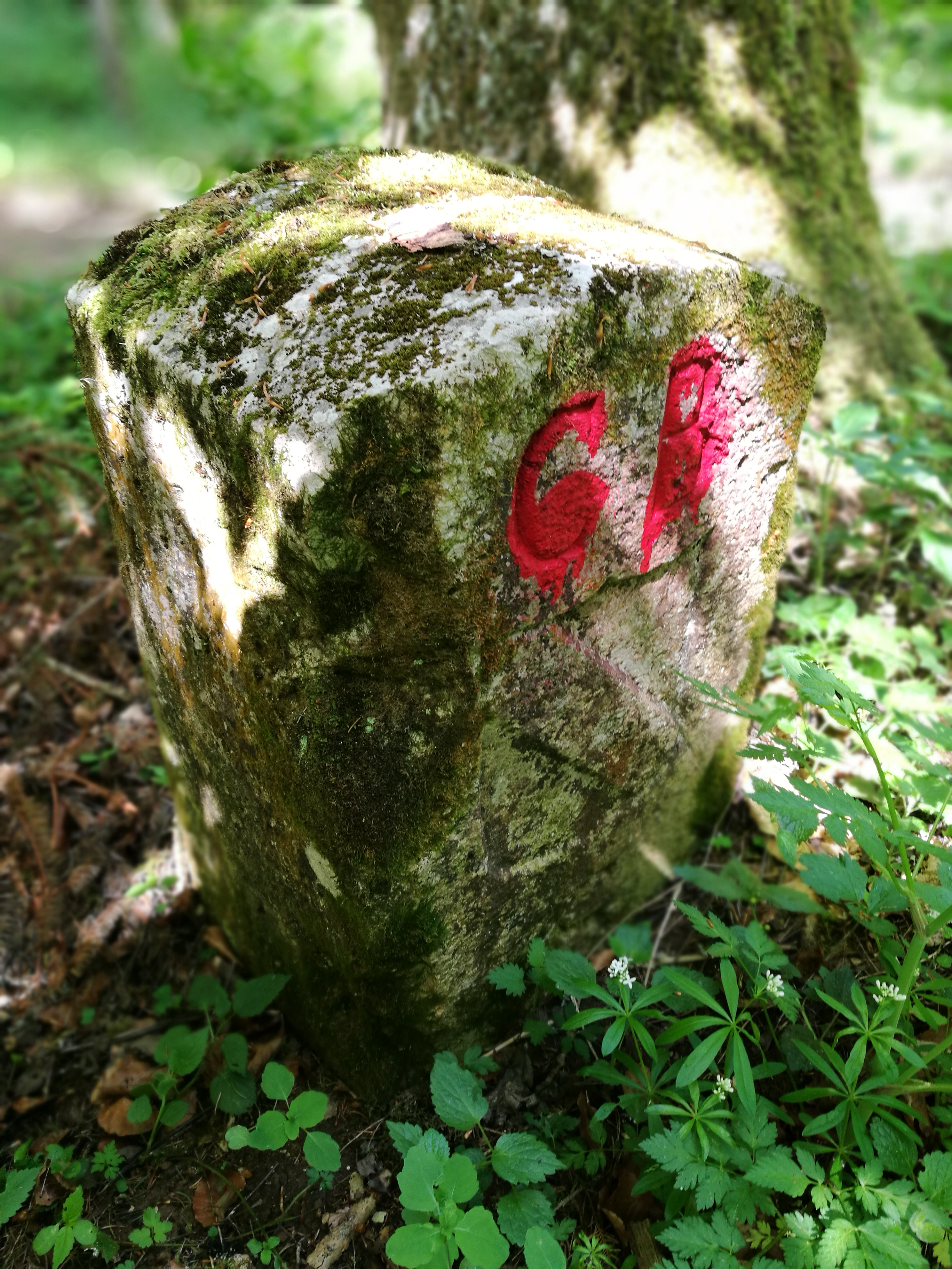 Deutschland (D) - Baden-Württemberg (BW) - Landkreis Tuttlingen (TUT) - Neuhausen ob Eck: Grenzstein am "Grenzweg" im "Lehrwald"